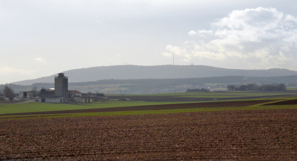 Donnersberg von Osten gesehen -- Donnersberg East side, Germany